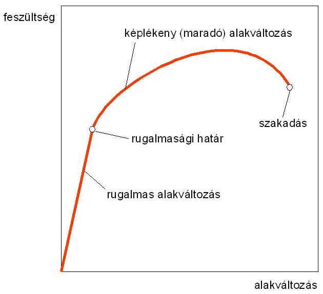 Szabadalakító gőz-légkalapácsok